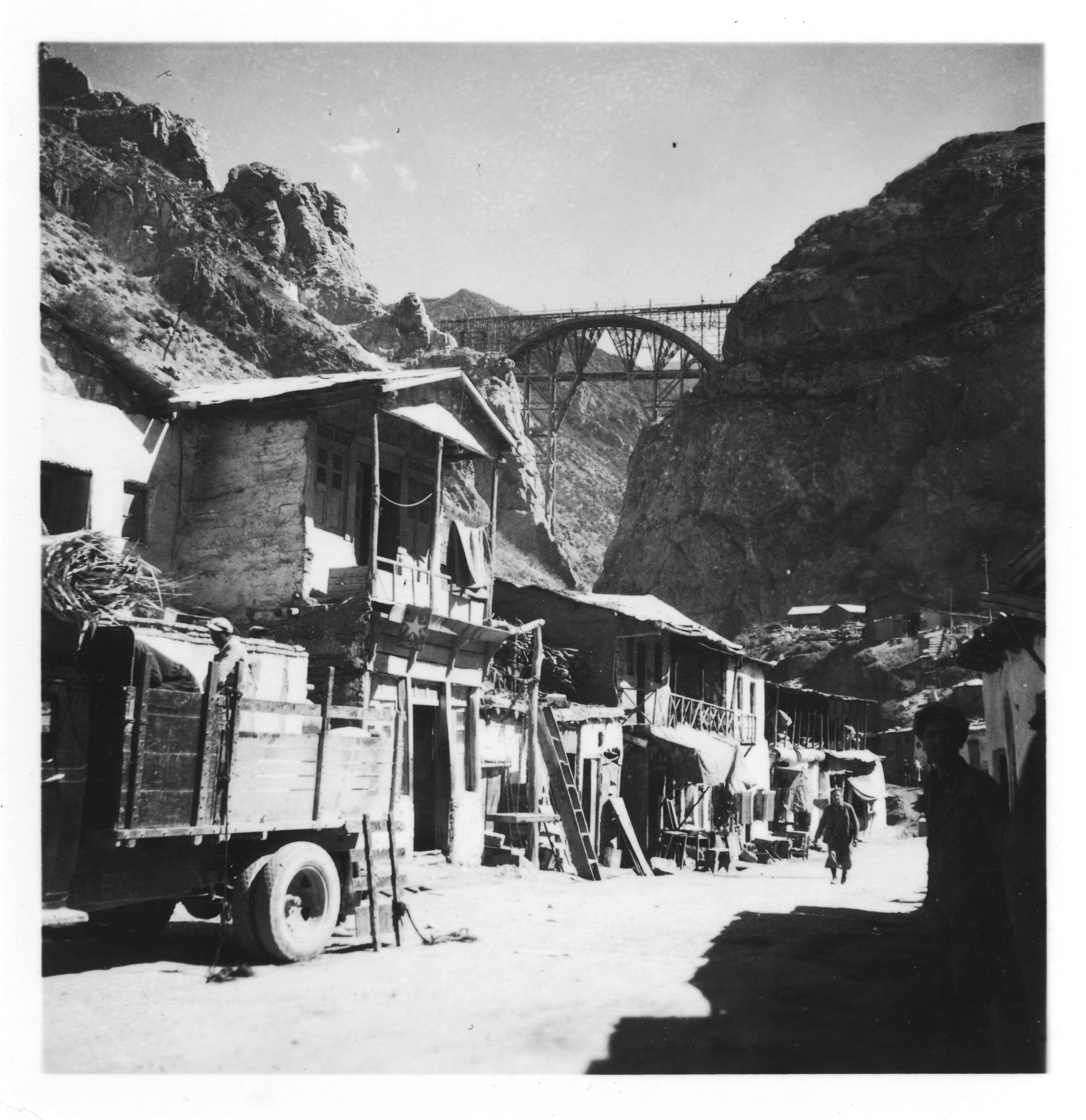 Persien, Firuskuh (Firuzkuh) im Elburs-Gebirge (Elburz): Siedlung; Bauarbeiter-Baracken, im Hintergrund eine Eisenbahnbrücke